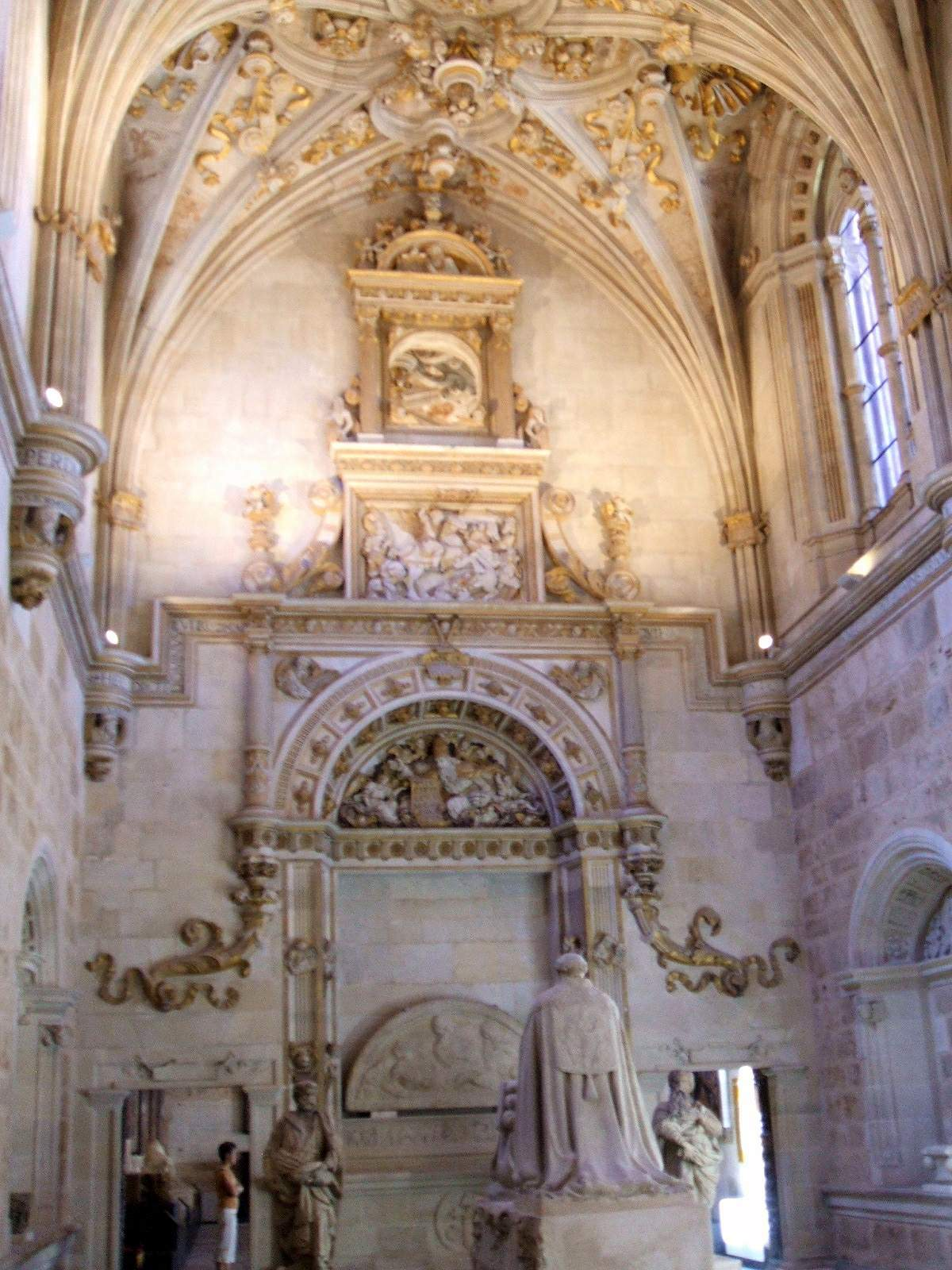 Antigua sacristía del Convento de San Marcós (León)